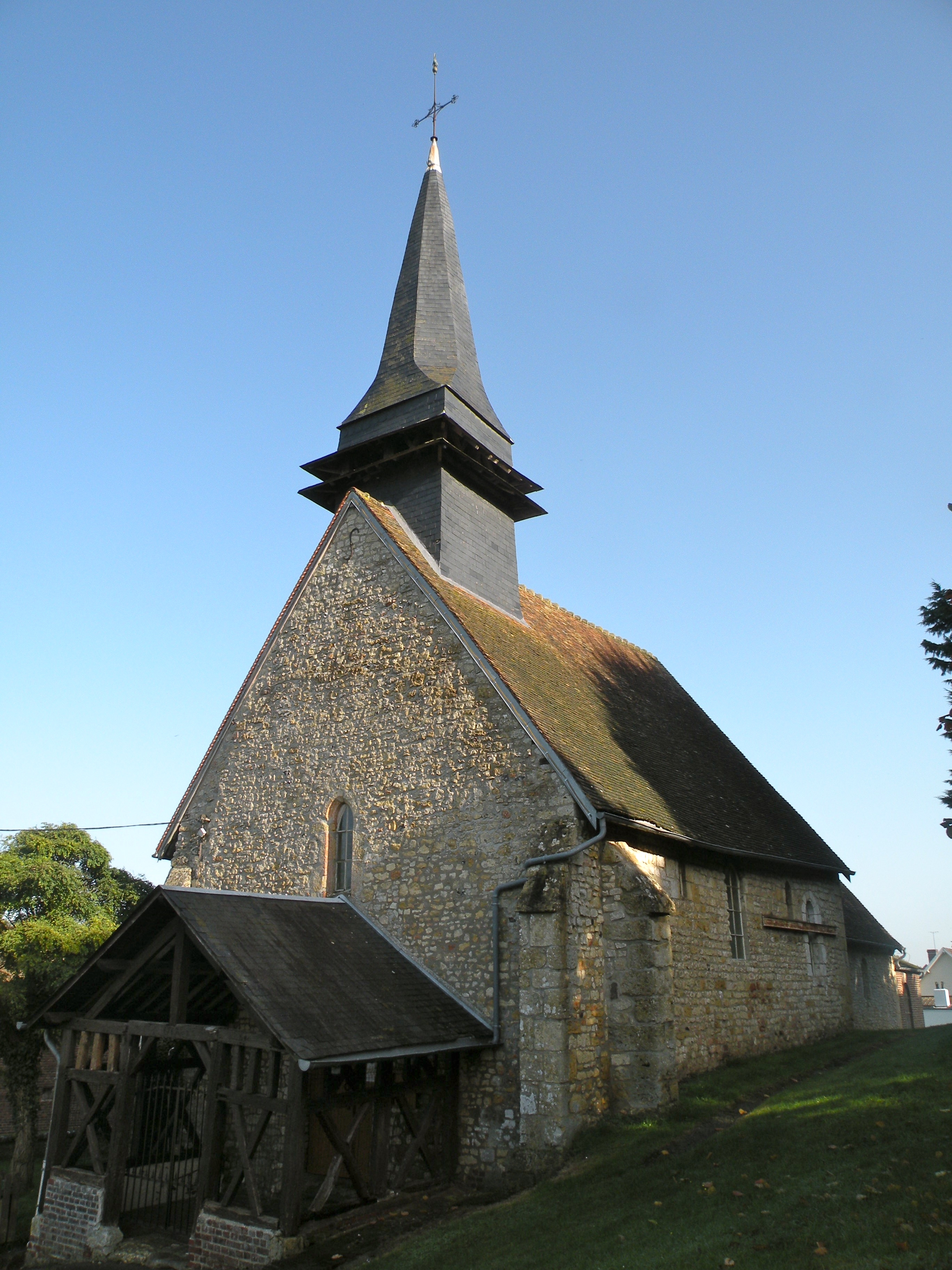 église à Herchies